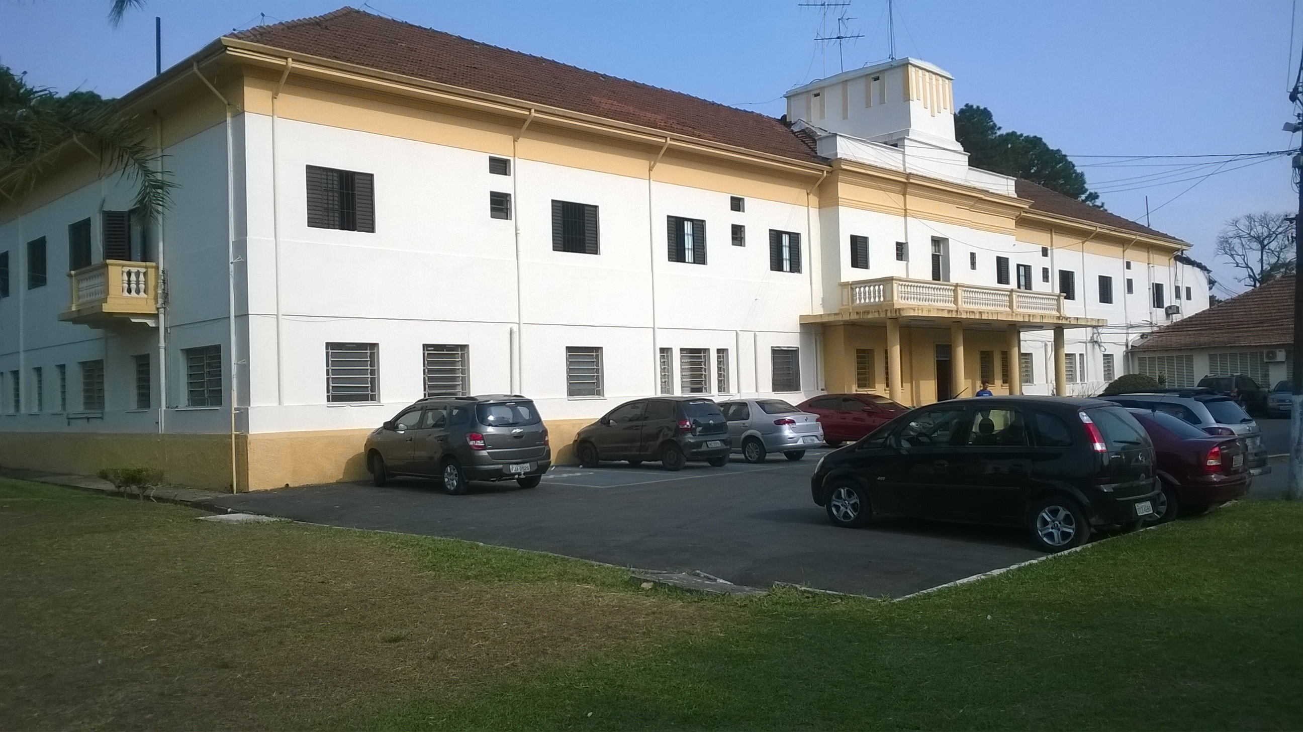 Fotografia tirada da parte lateral do prédio do Complexo Padre Bento. O Complexo Hospitalar Padre Bento foi fundado em 1931, na época tinha o nome de Sanatório Pare Bento. Este que foi durante muito tempo um lugar de tratamento compulsório de pessoas que haviam contraído hanseníase (doença conhecida como lepra na época). O Padre Bento possui uma importância muito grande para os bairros próximos , como o Jardim Tranquilidade e o Gopoúva.